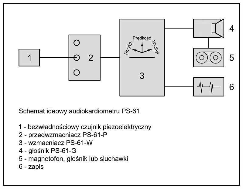 Schemat ideowy audiokardiometru PS-61.